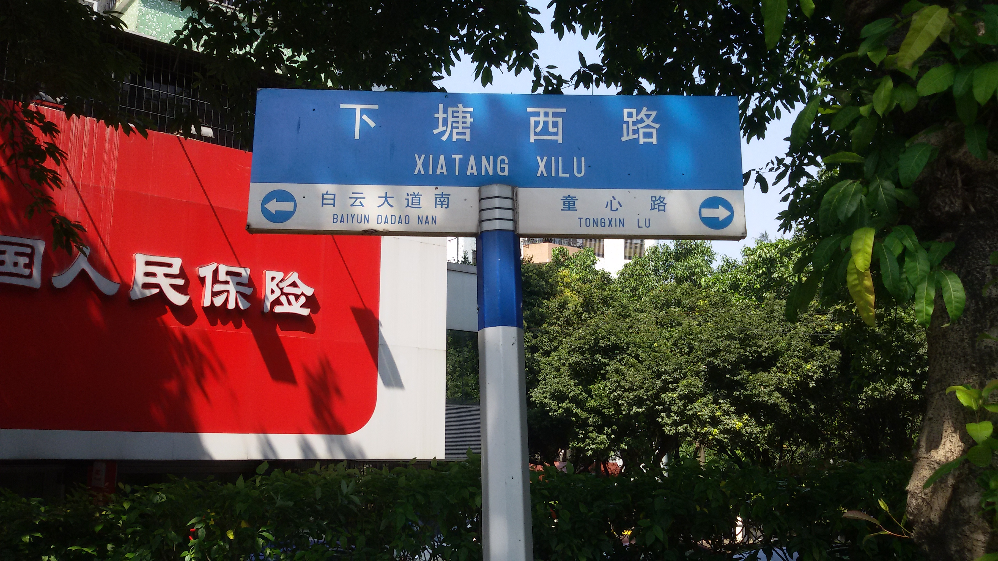 粵語: 下塘西路嘅路牌